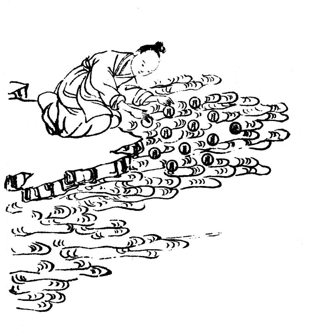 A 12 Holdat fürdető Changxit ábrázoló illusztrációja a Shan hai jingban (1930 előtti kiadás nyomán).